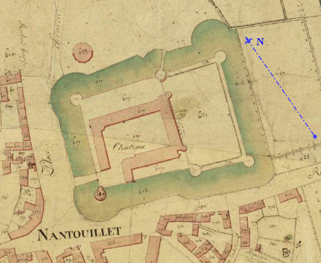 Localisation du château sur le cadastre napoléonien.